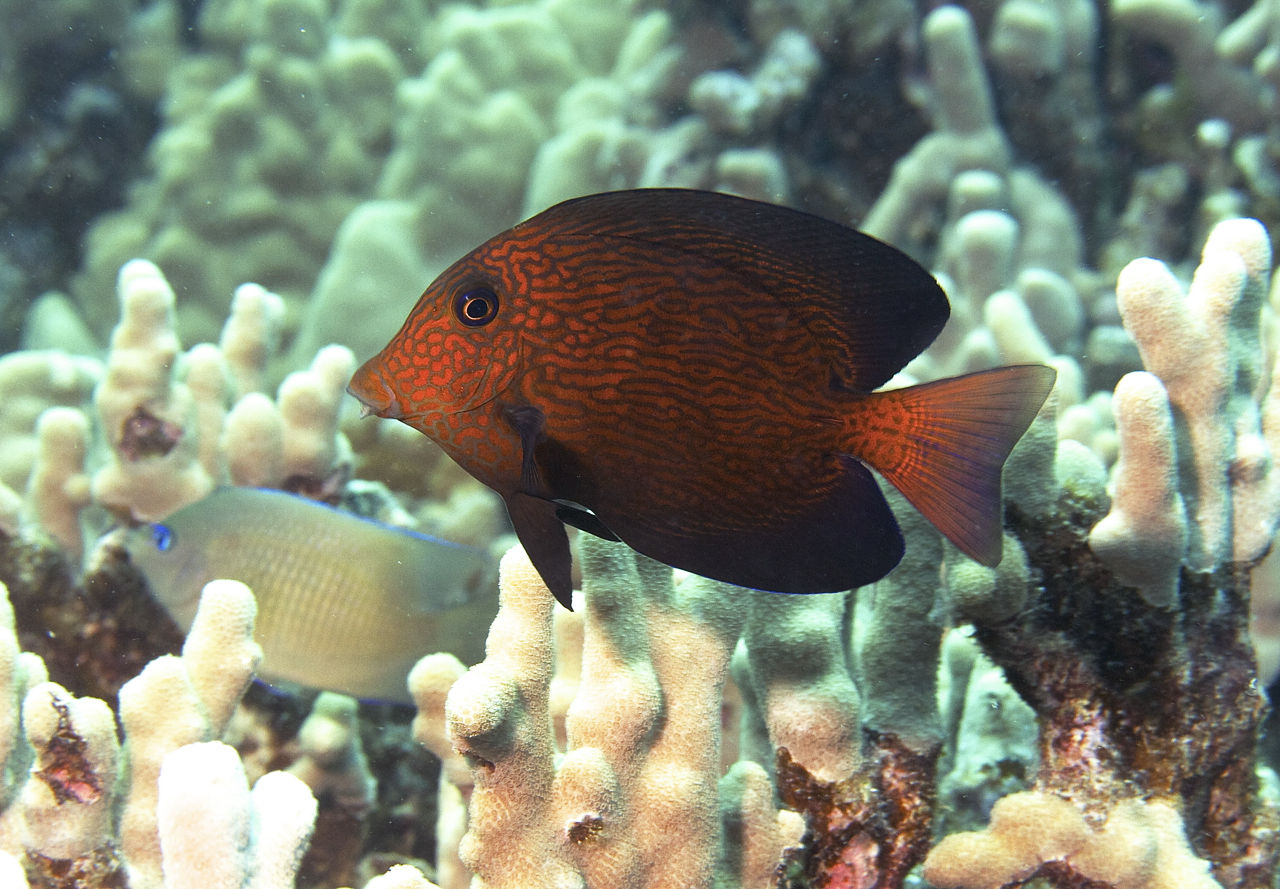 Ctenochaetus hawaiiensis en Kona, Hawái